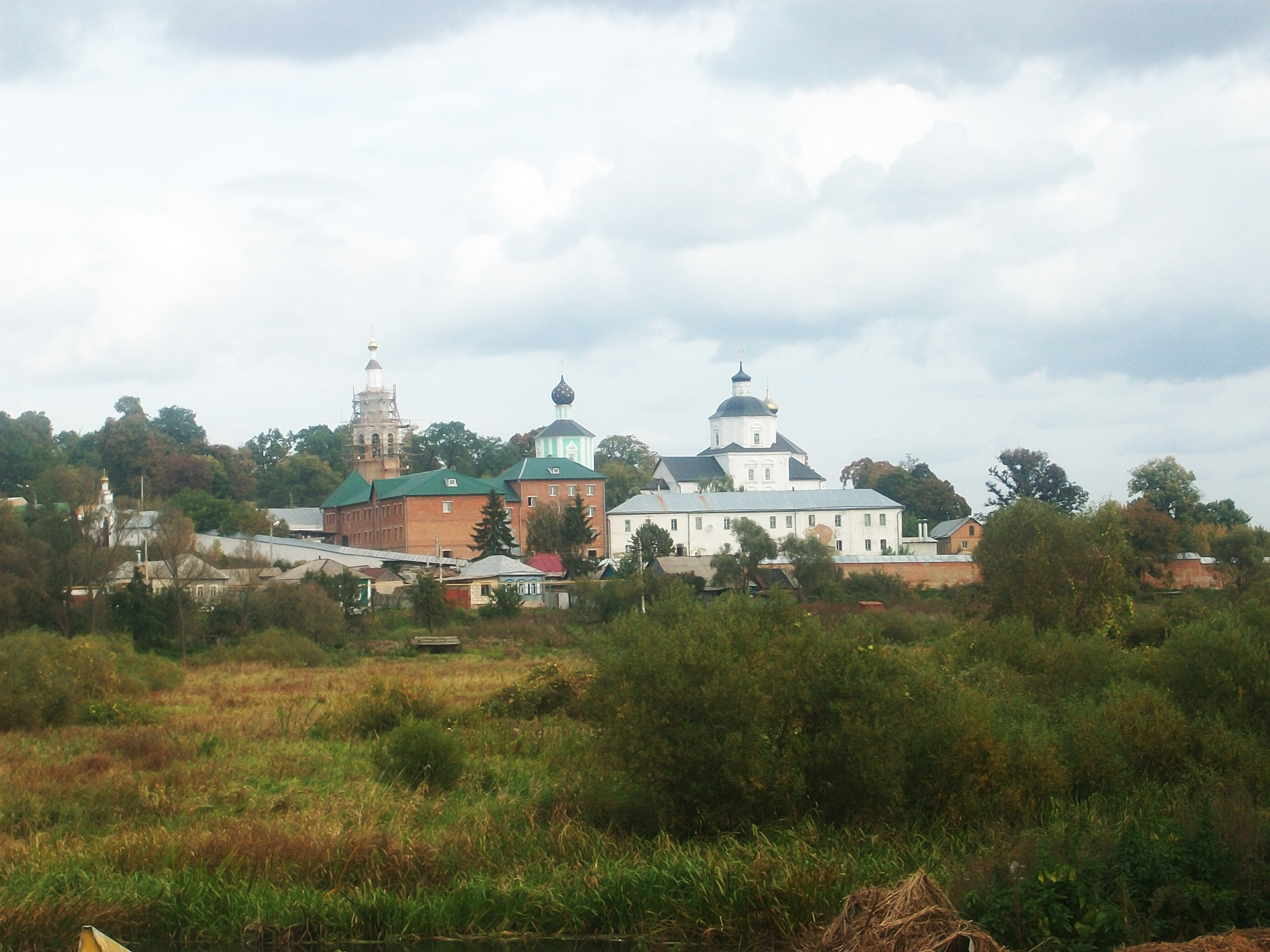 Рыльский Свято-Николаевский мужской монастырь (общий вид)